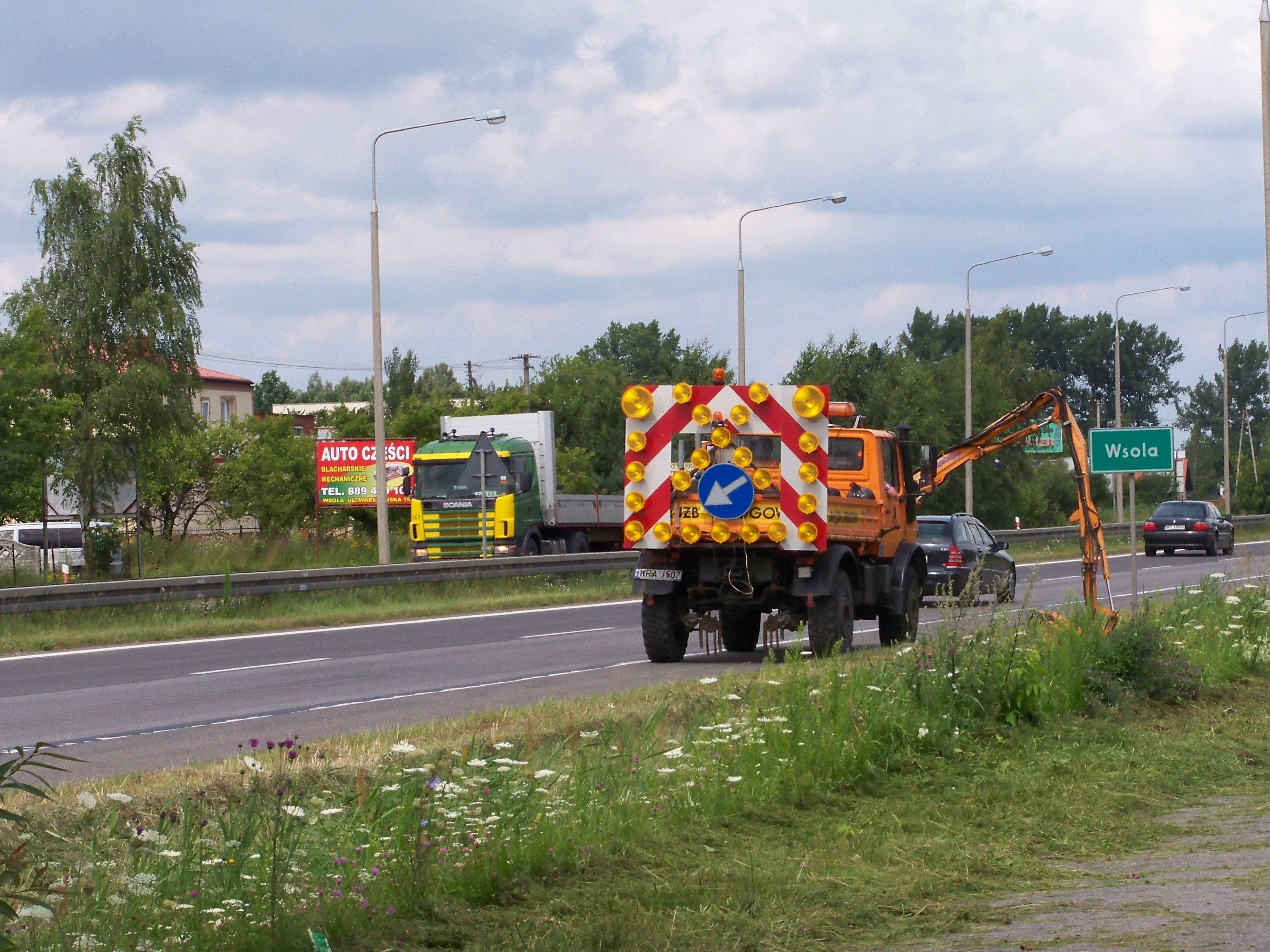 Wsola, ulica, roboty drogowe